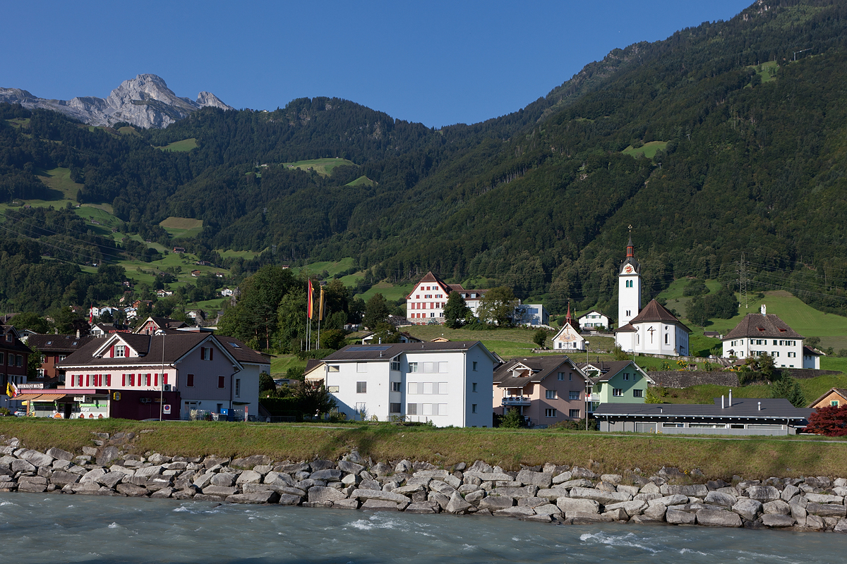 Attinghausen an der Reuss